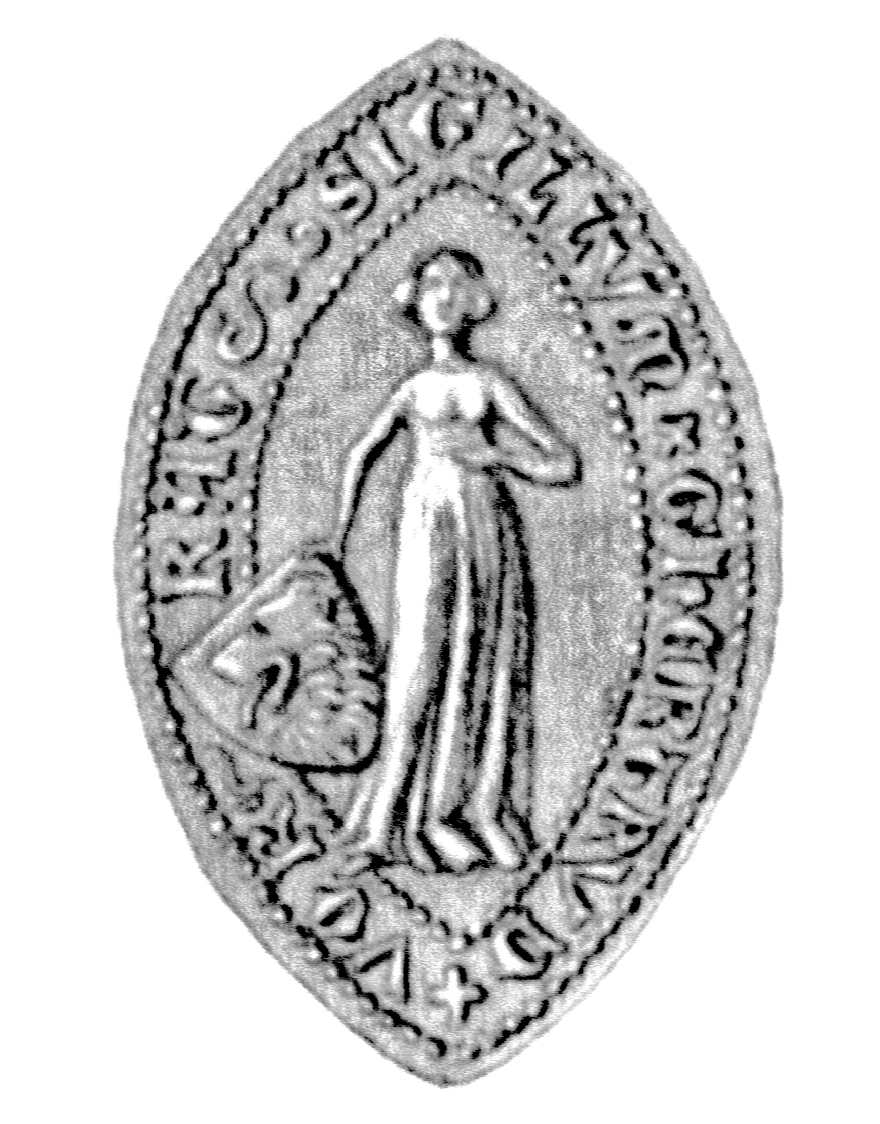 Siegel der Ghese Vorrades. Das Siegel stammt aus der Zeit um 1398. Gesche/Gertrud geb Pleskow war die Witwe des 1385 gestorbenen Ratsherrn Dietrich=Tiedemann Vorrade (Ratslinie # 416). "de erbare Gese" verkaufte (LUB 5, Nr. 339, vgl. Nr. 343) die Güter Stockelsdorf und Mori 1410 an den (Neuen) Rat, der sich dafür verpflichtete, aus den Einkünften die von ihr gestiftete Kapelle an Ägidien (Vorrade- oder Kalven-Kapelle, das ist die große querschiffartige Kapelle im Nordschiff, die Wilhelm Jannasch zur Gedenkkapelle ausbauen ließ und die jetzt als Choraufstellfläche genutzt wird) zu unterhalten. Sie wurde hier 1416 auch beigesetzt; der Verkauf wurde später für unrechtmässig erklärt, 1441 erhielten die Kalvens als ihre Nacherben die Güter und das Patronat über die Kapelle. Ihre Grabplatte ist nicht erhalten.